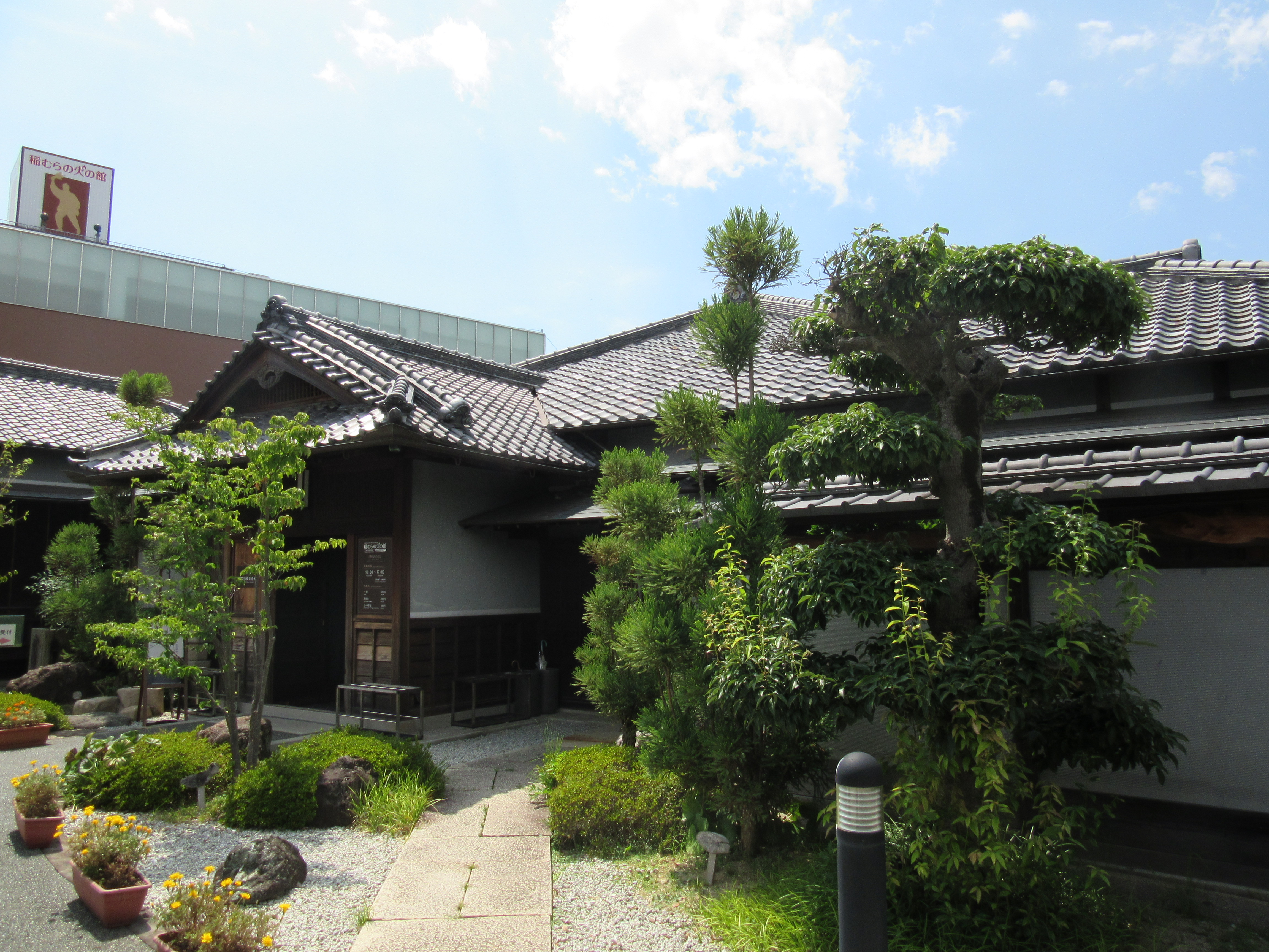 稲むらの火の館